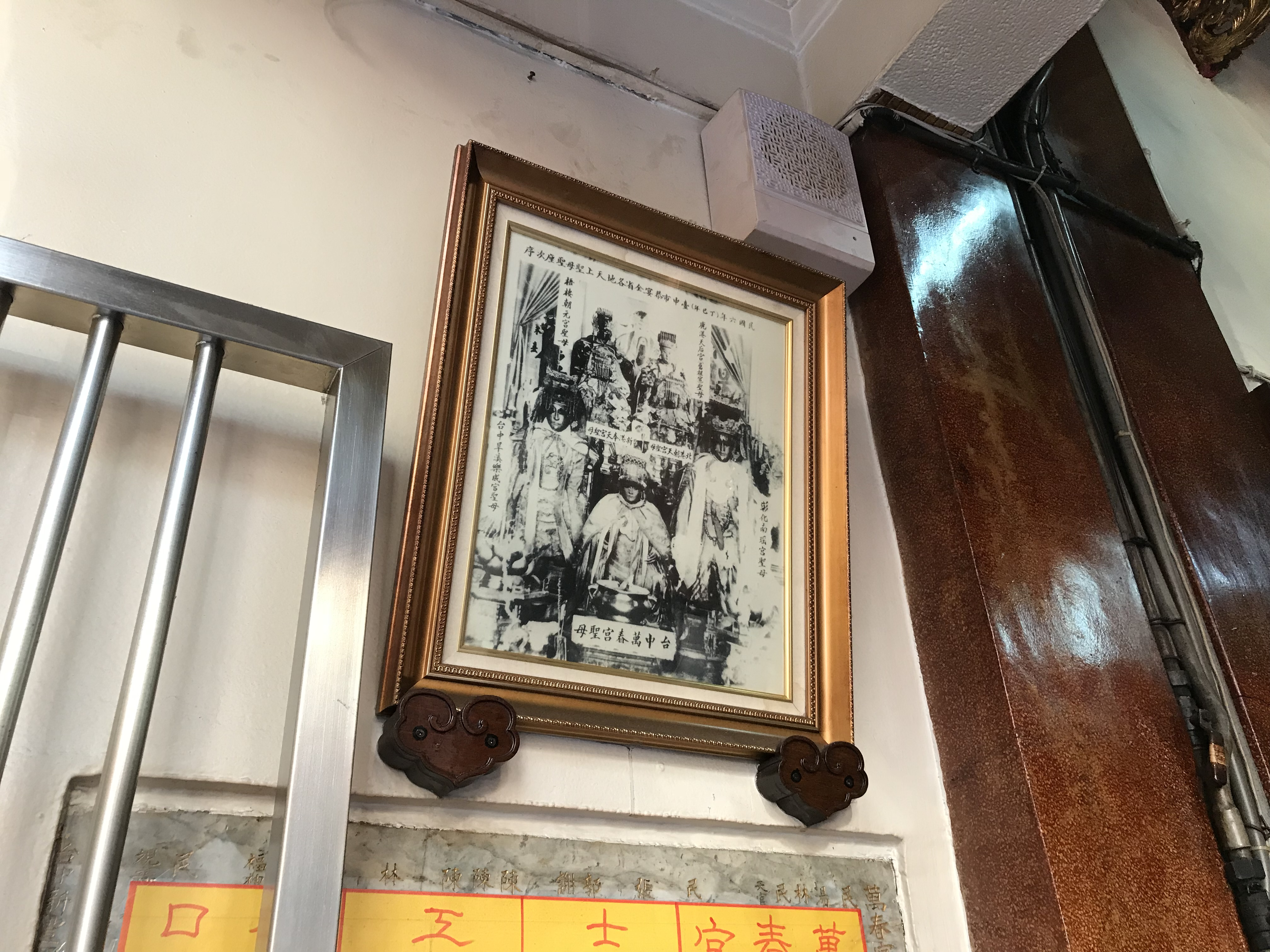 萬春宮七媽會神像照片